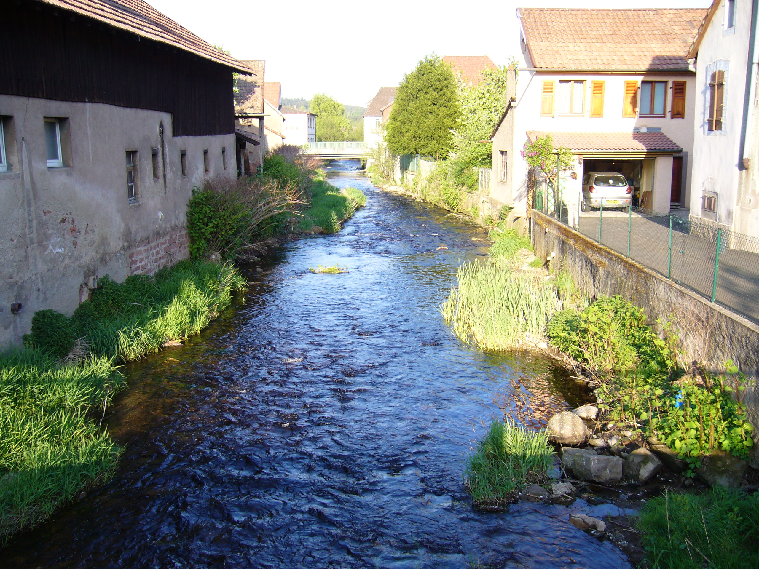 La Lièpvrette depuis Lièpvre